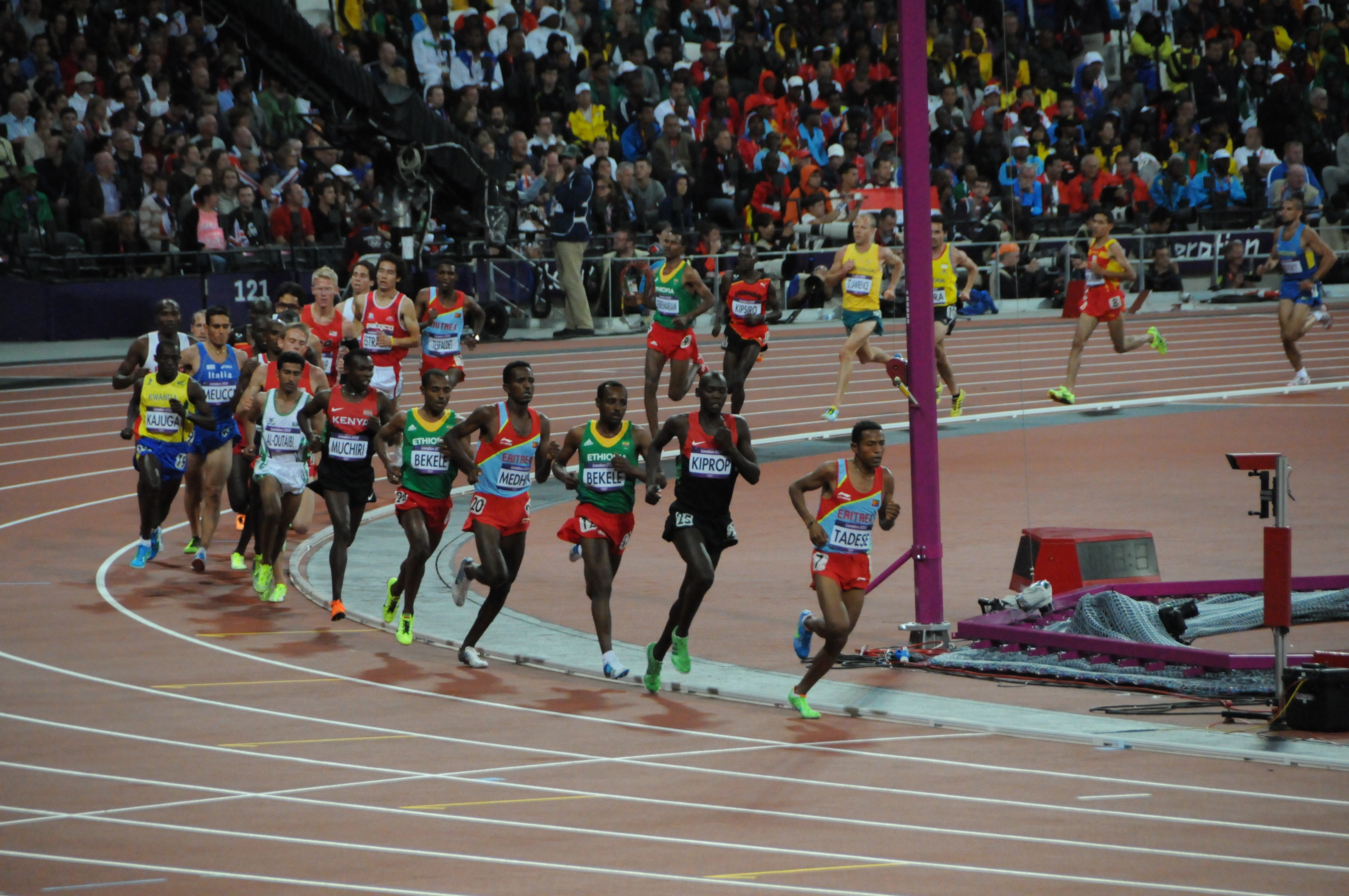 Course du 10000 m au stade olympique de Londres, Robert Kajuga, Daniele Meucci, Moukheld Al-Outaibi, Bedan Karoki Muchiri, Kenenisa Bekele, Teklemariam Medhin, Tariku Bekele, Wilson Kiprop, Zersenay Tadese